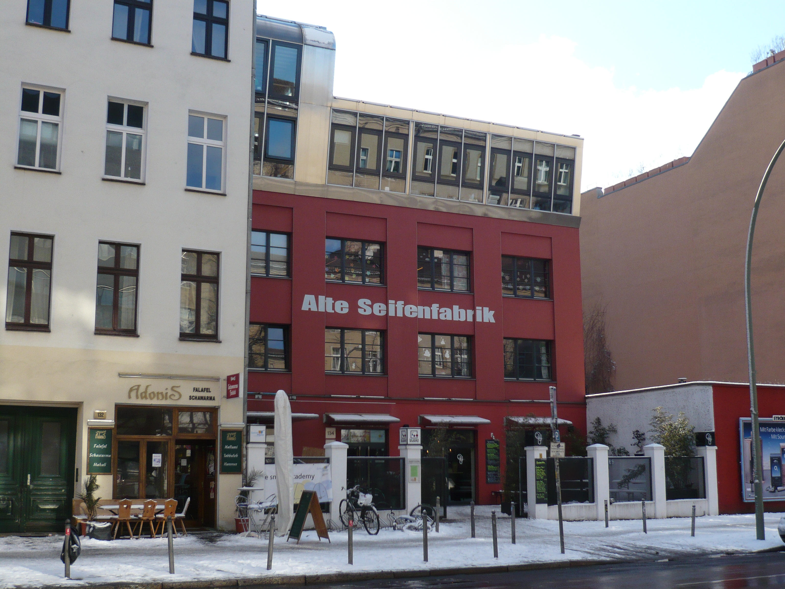 Torstraße 134 in Berlin-Mitte: Alte Seifenfabrik